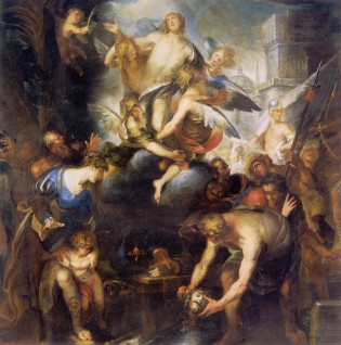 Domenico Piola, Martirio e gloria di San Giacomo (1647), San Giacomo della Marina (Genoa)